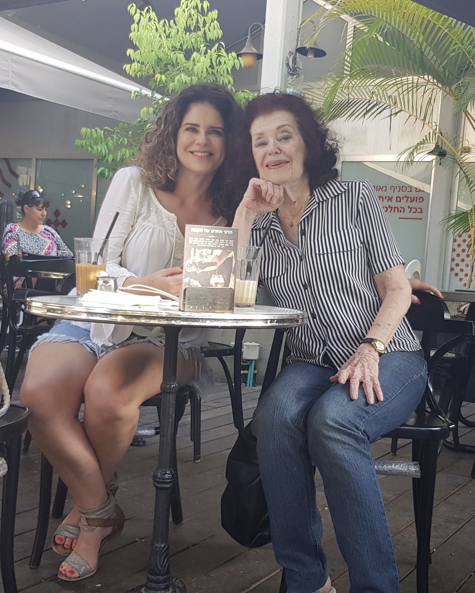 לימור שפירא ושפרירה זכאי.